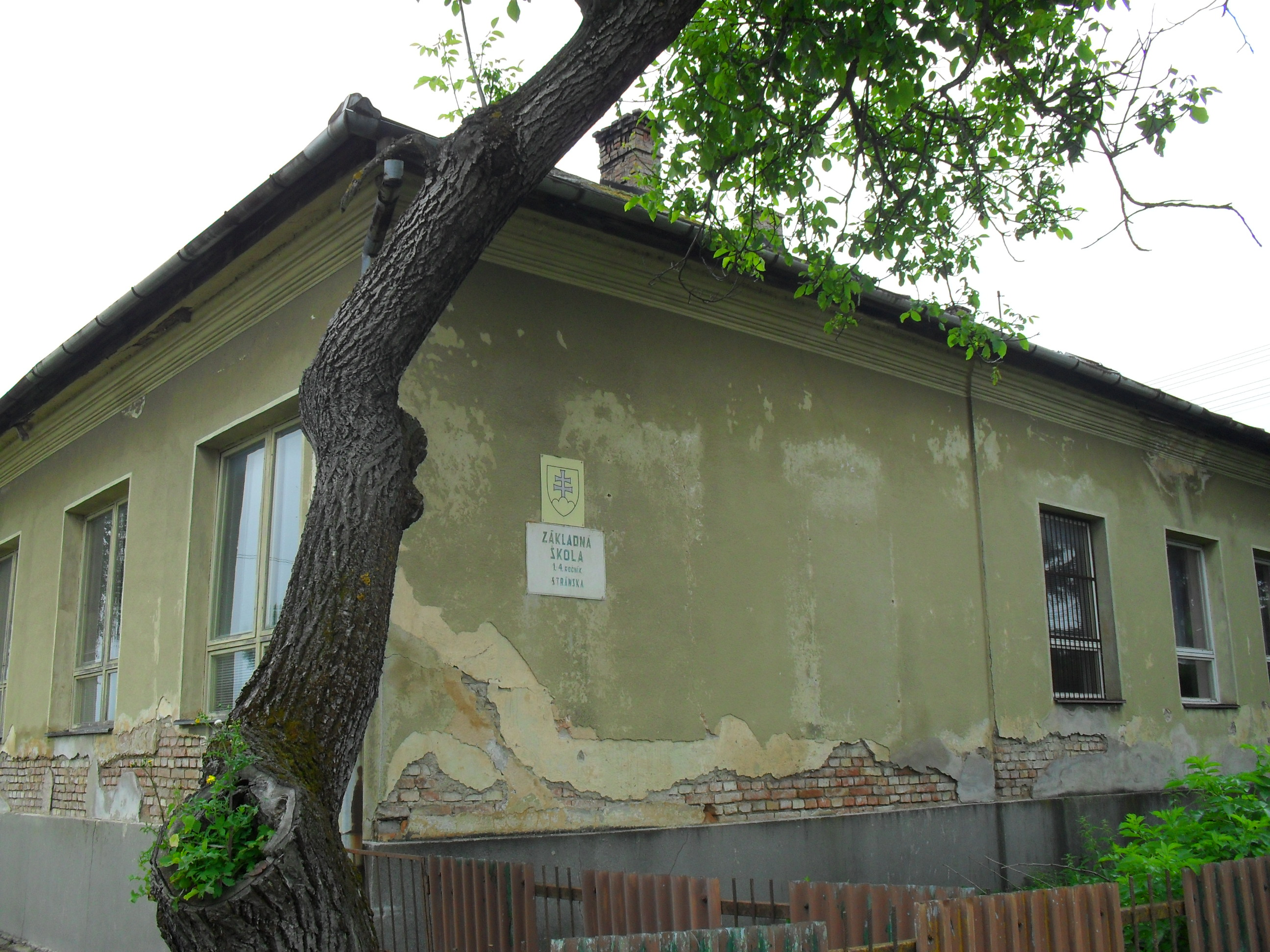 Oldalfala - volt alapiskola